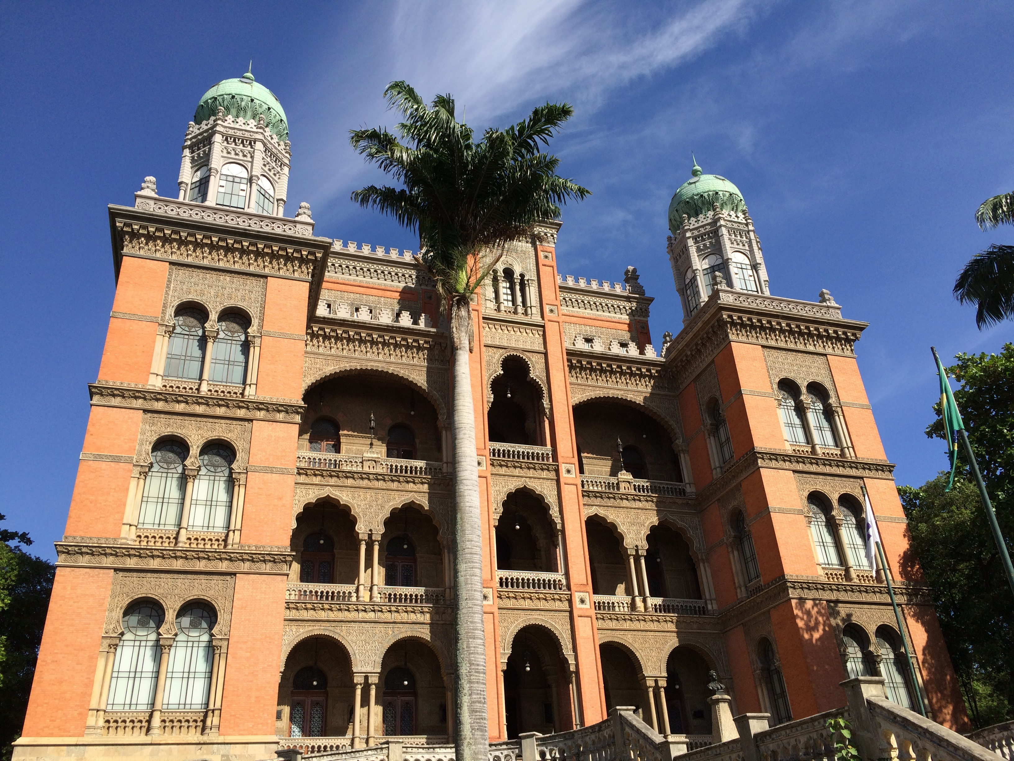 Palácio de Manguinhos ou Prédio da Fundação Oswaldo Cruz na Av. Brasil, nº 4365